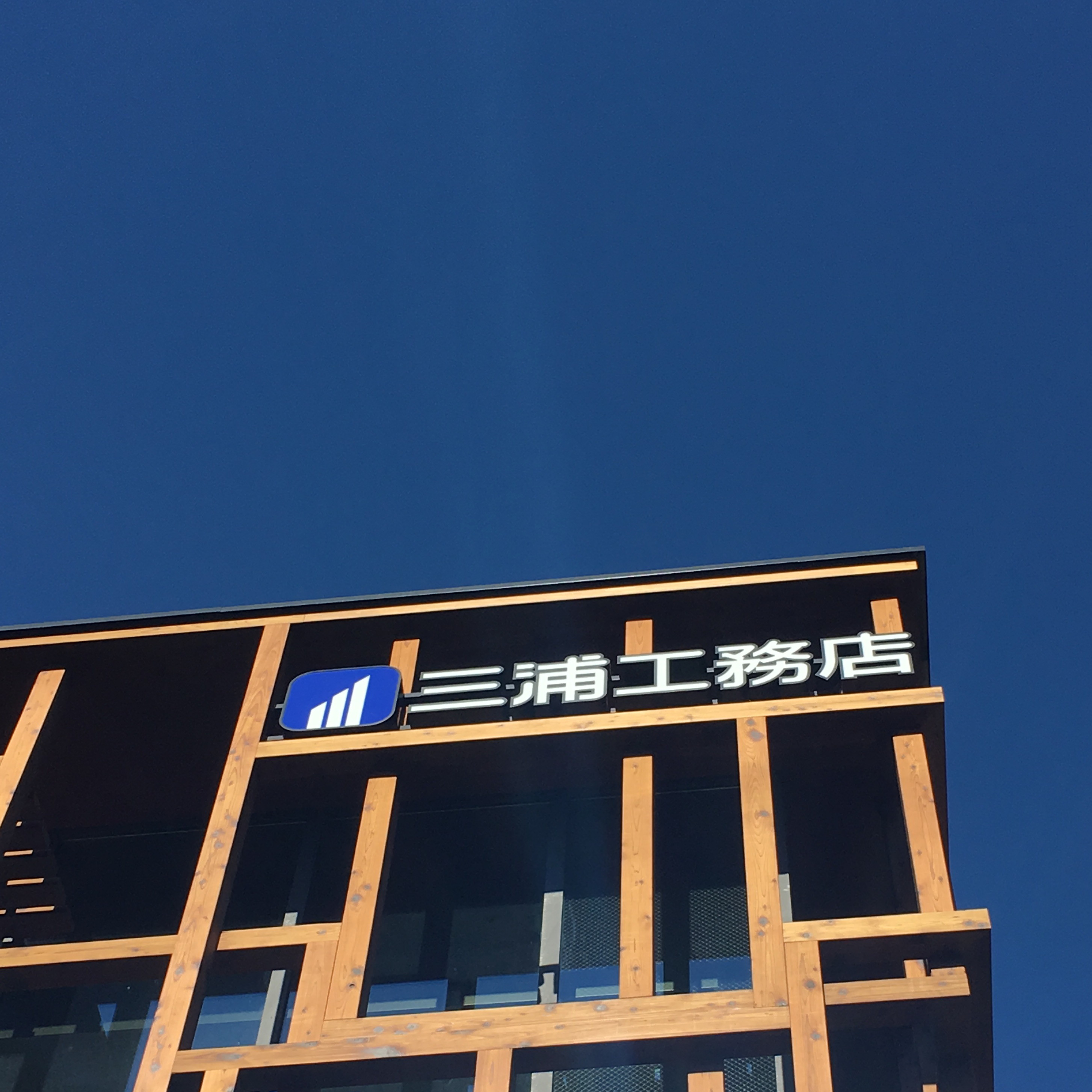 三浦工務店本社